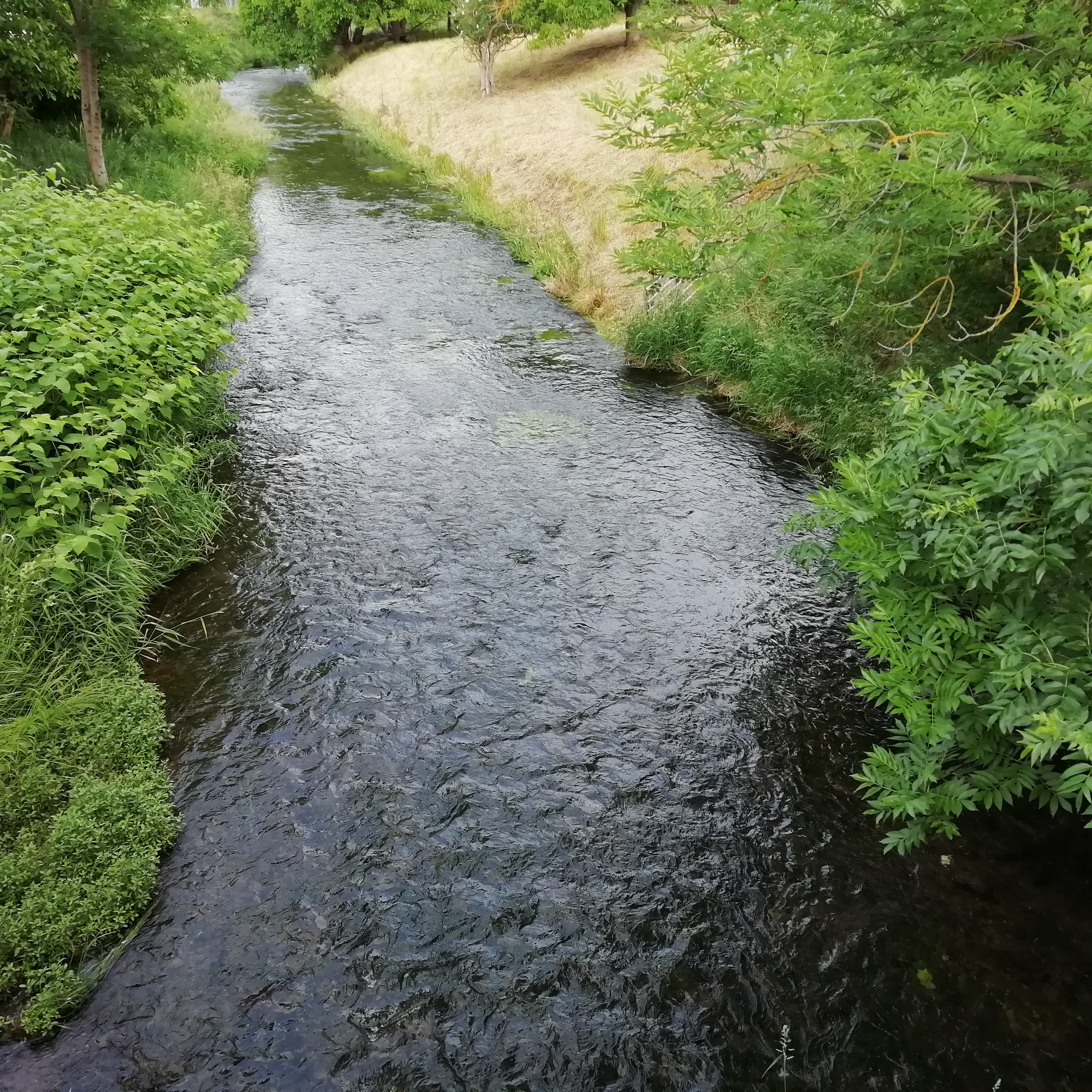 Die Helbe (hier Steingraben genannt) südlich von Grüningen im thüringischen Kyffhäuserkreis.